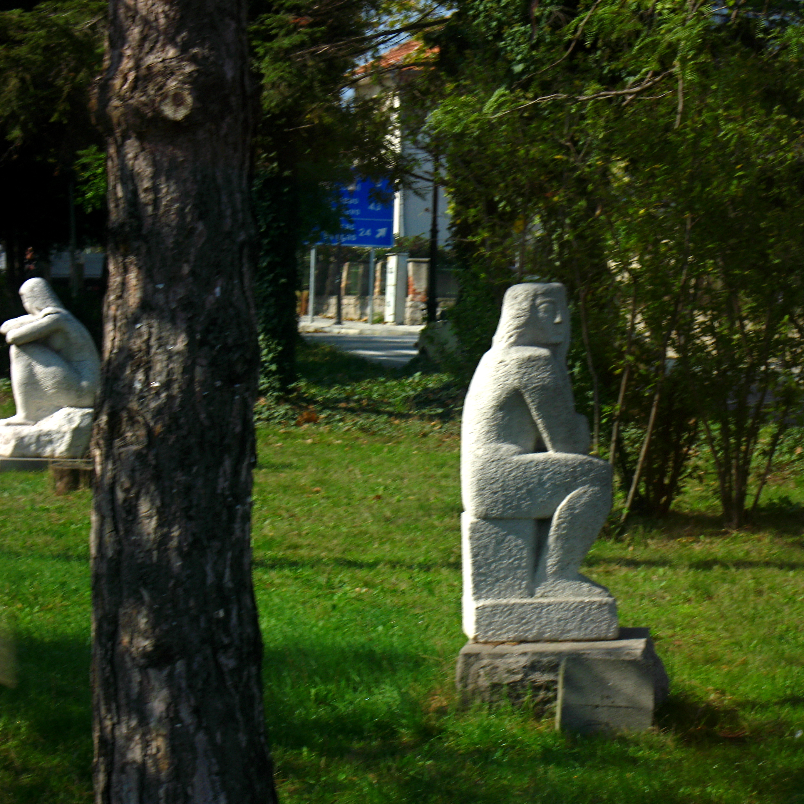 Черноморец_4389